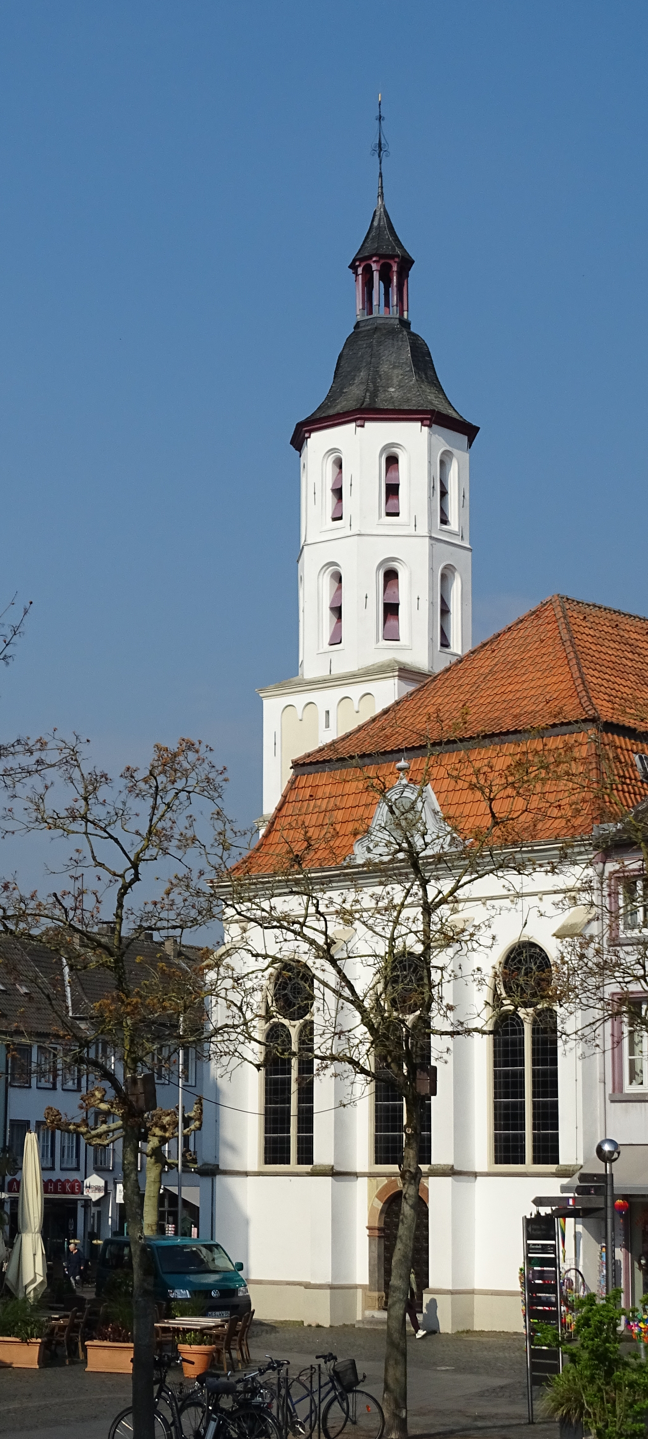 De evangelische kerk in Xanten, Duitsland.